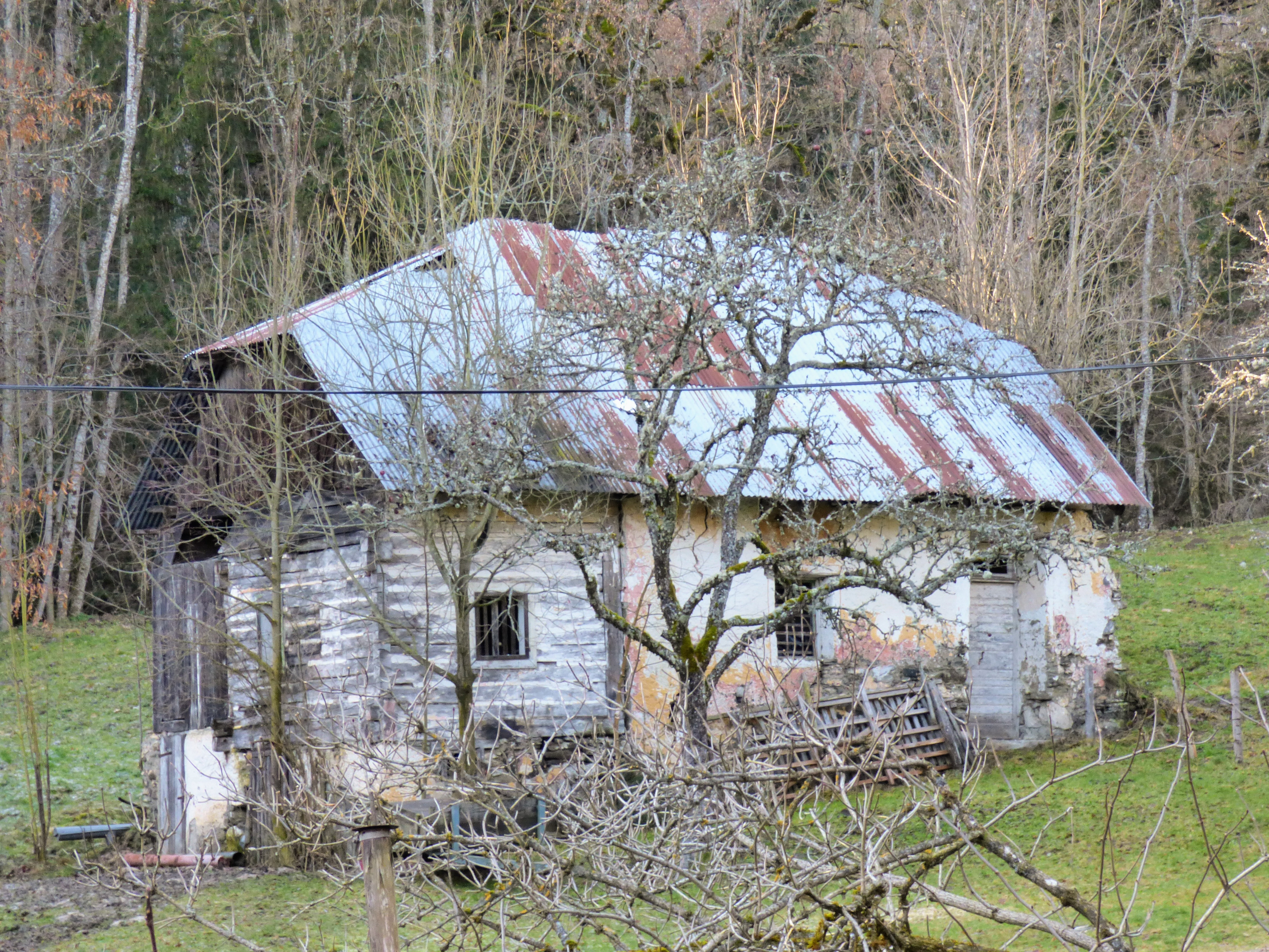 verfallendes Haus westlich vom Haus Grund Nr. 7, Gemeinde Liebenfels (Kärnten)